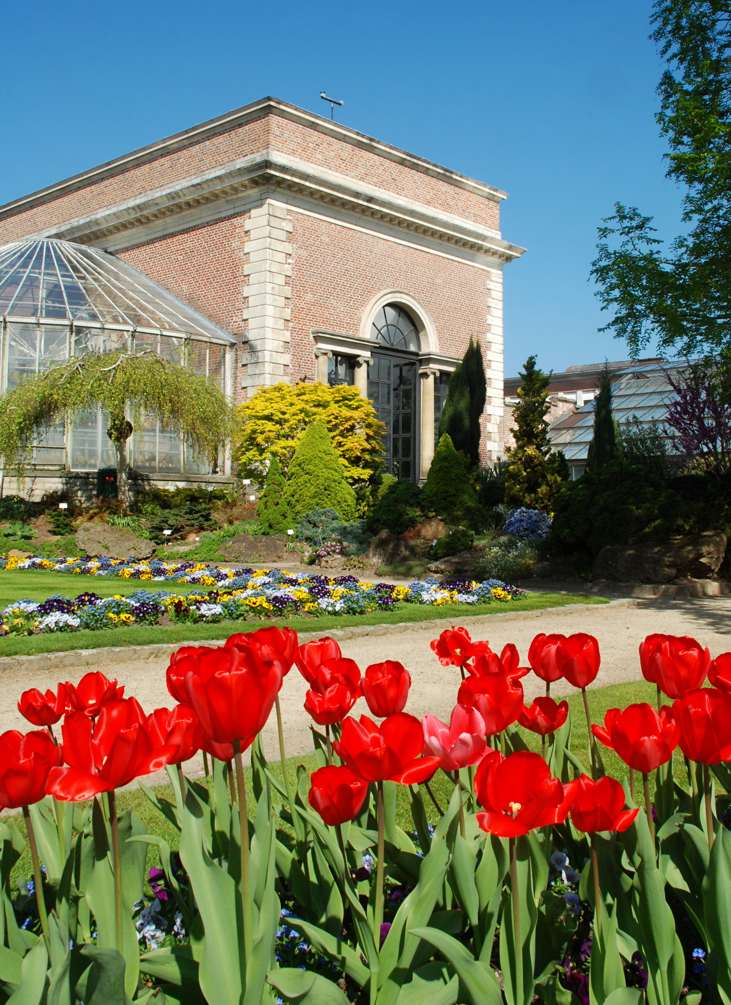 Belgique - Louvain - Jardin botanique (Kruidtuin) - orangerie néo-classique (architecte Charles Vander Straeten - 1821)